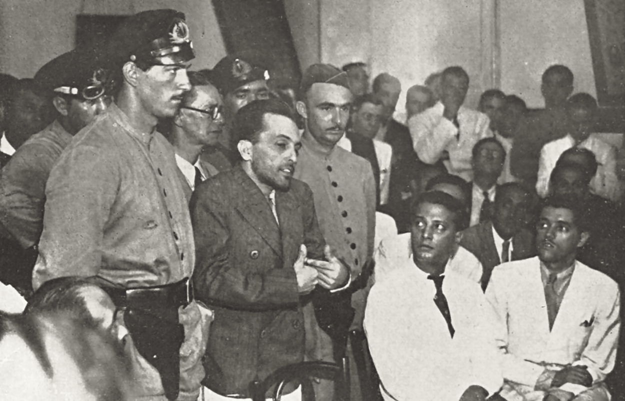 O líder comunista brasileiro Luiz Carlos Prestes, em julgamento pelo Tribunal de Segurança, 1937.